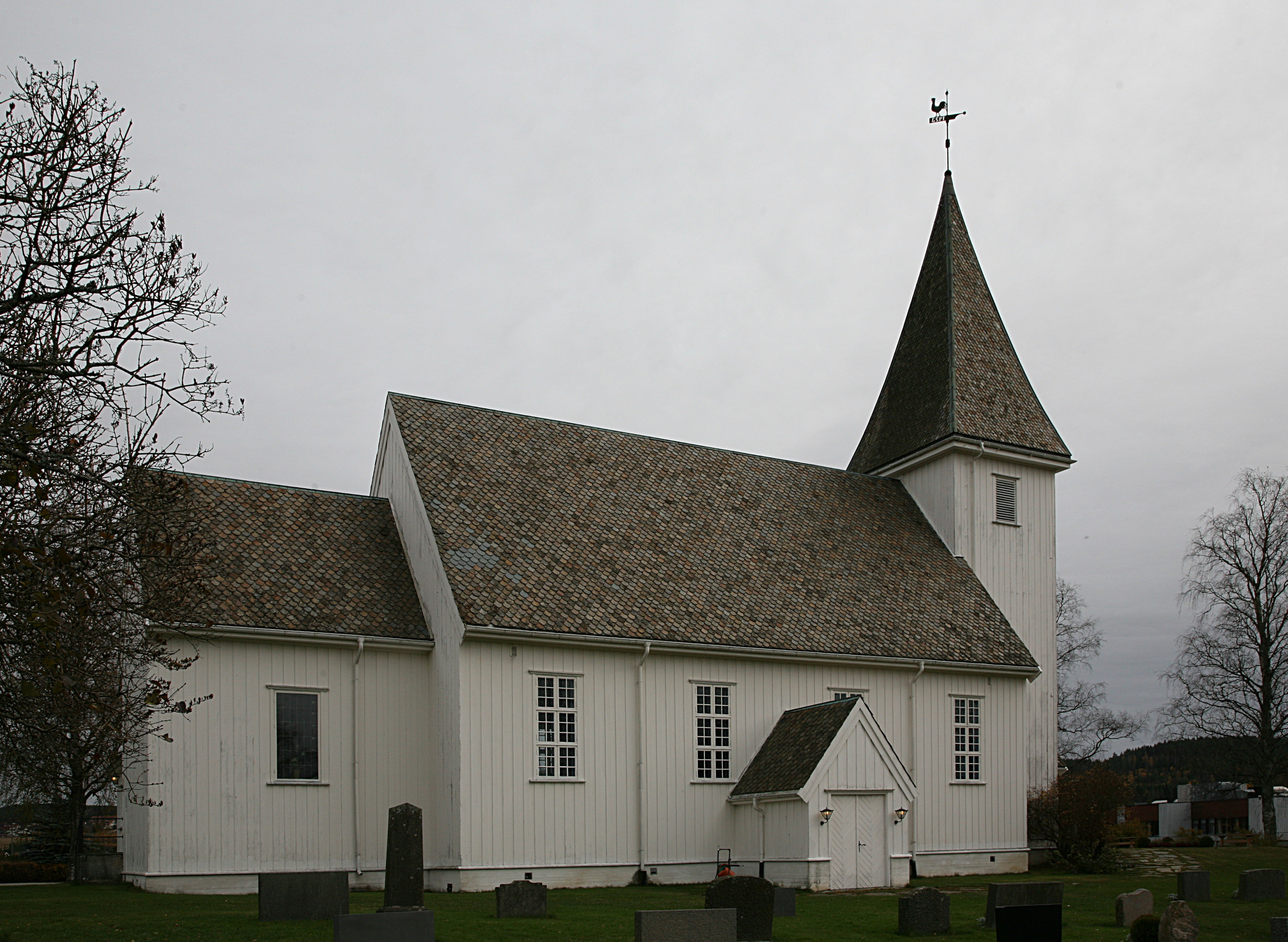 Bjørkelangen kirke. Church in Aurskog-Høland, Akershus, Norway.